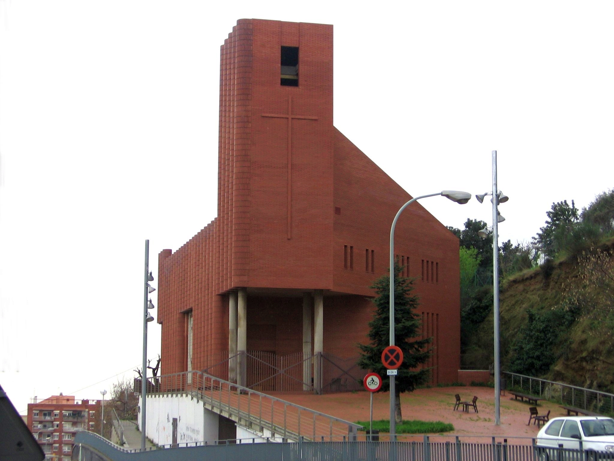 Vista del nuevo edificio inaugurado en 1988 en el Santuario de Nuestra Señora del Monte Carmelo, distrito de Horta-Guinardó (Barcelona)